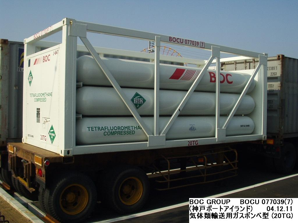 幾つもの細長いガスボンベを纏め、20ft型にユニット化したガス輸送用コンテナ。 ※詳しくは画像拡大の上、焼付け説明文を参照して下さい。 【2004年12月11日 兵庫県／神戸ポートアイランド】